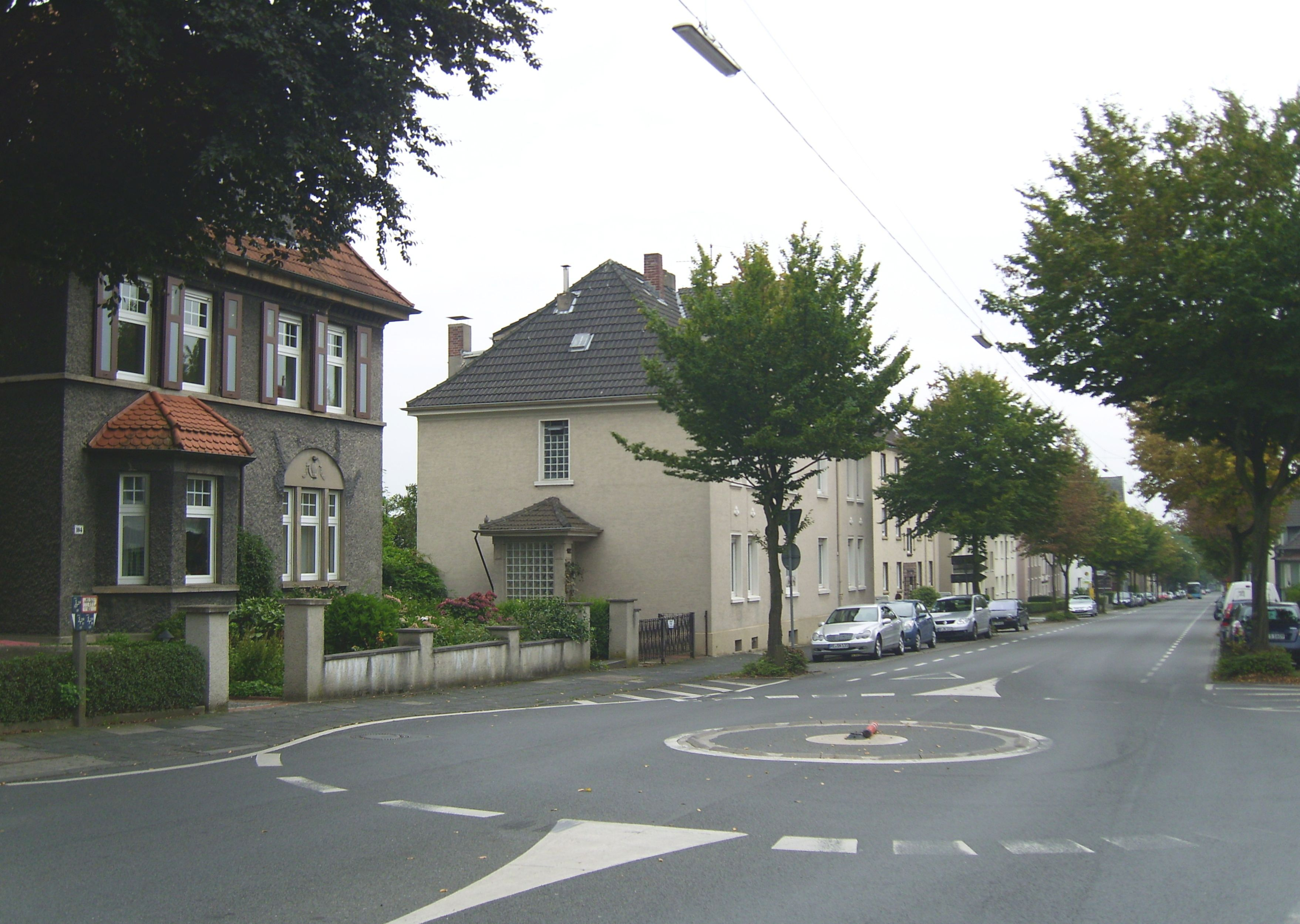 Die untere Dortmunder Straße im Recklinghäuser Ostviertel; links das Haus Nr. 104, das zwischen 1907 und 1921 erbaut wurde; die rechts folgenden Häuser sind deutlich jünger